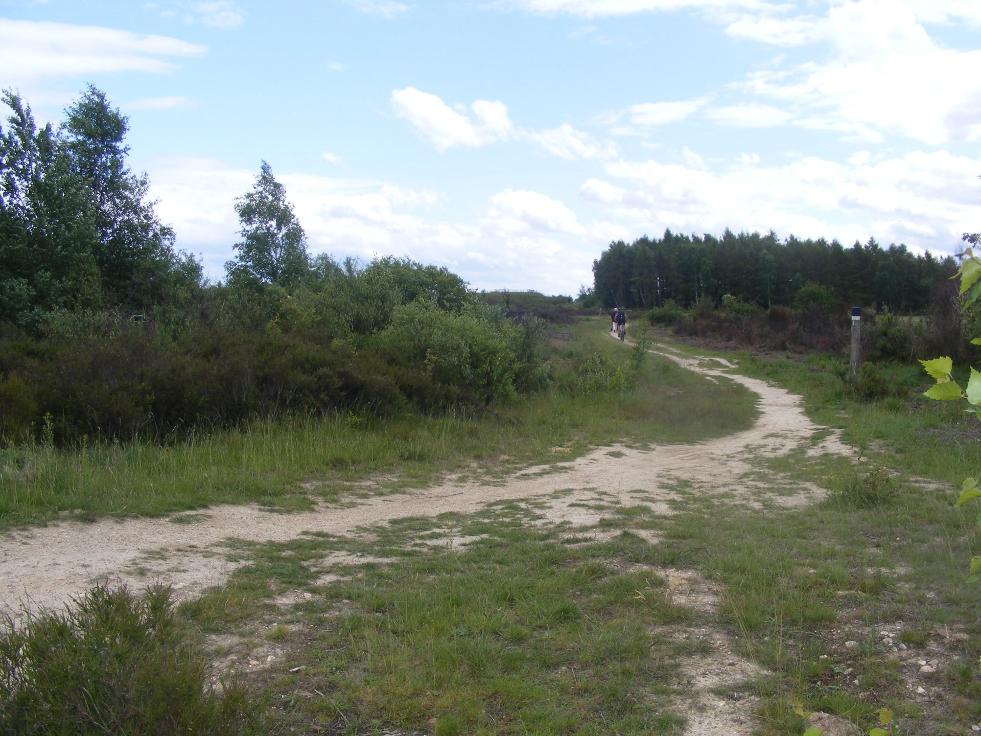 Drover Heide